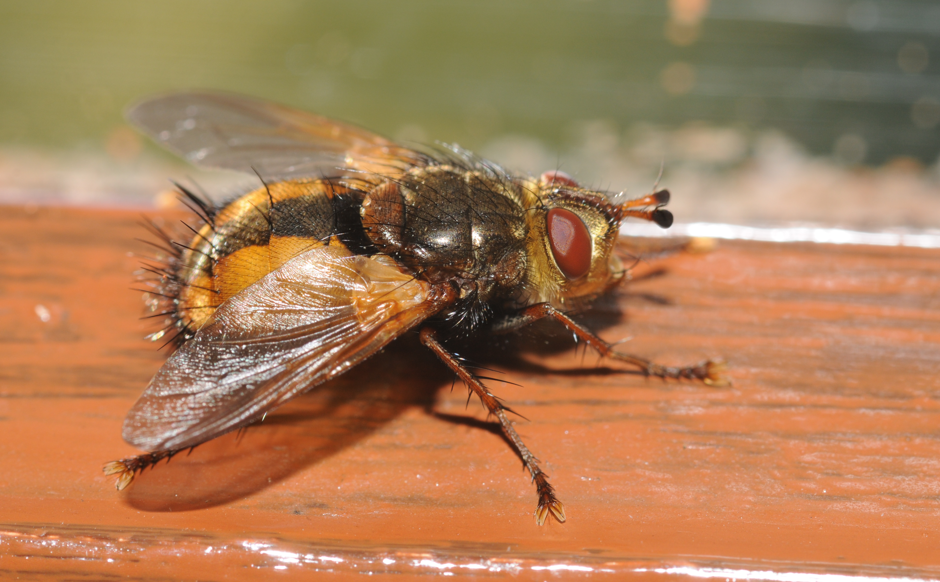 Tachina fera